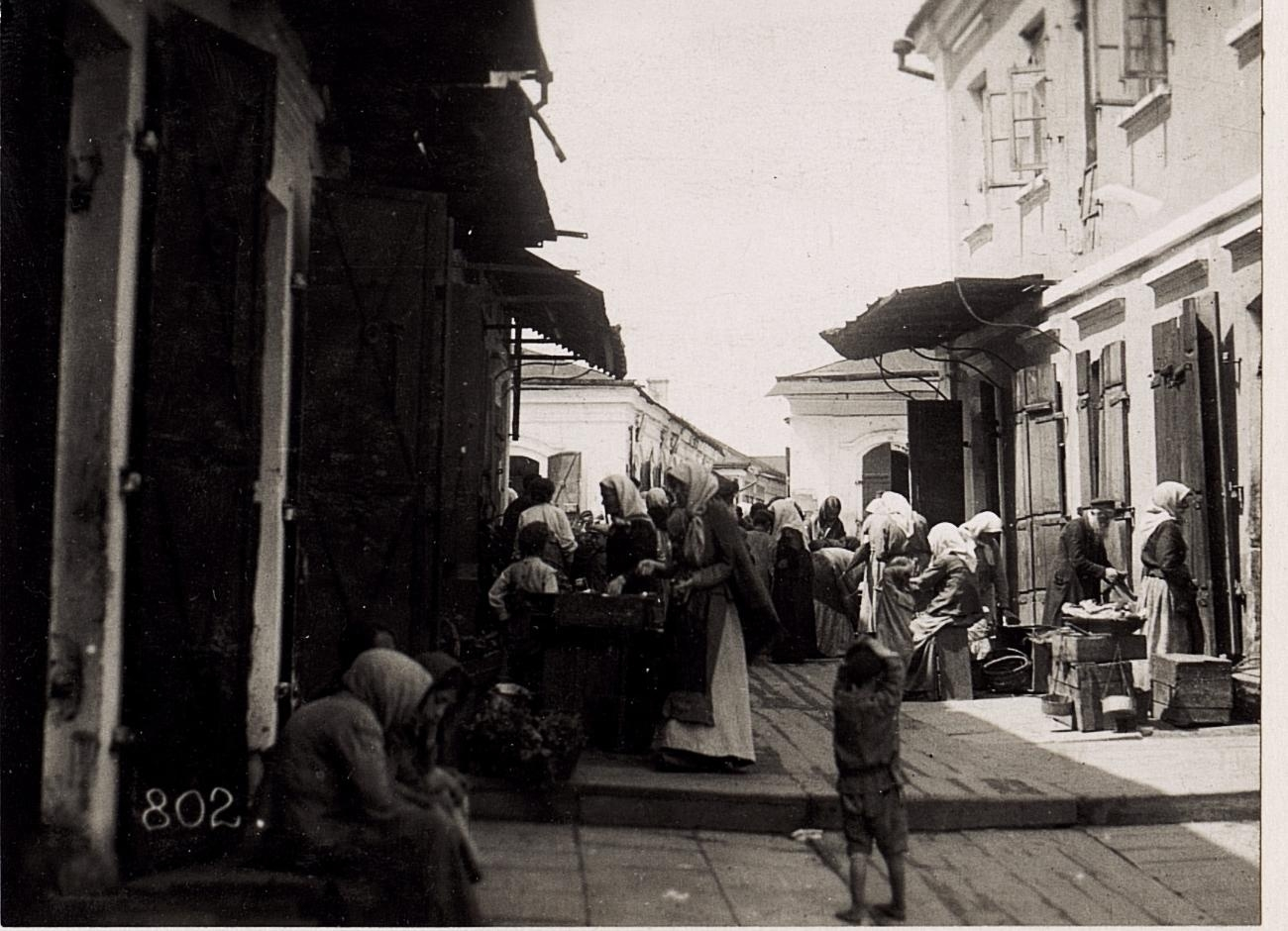 Gasse bei der jüdischen Synagoge in Wladimir Wolinsky